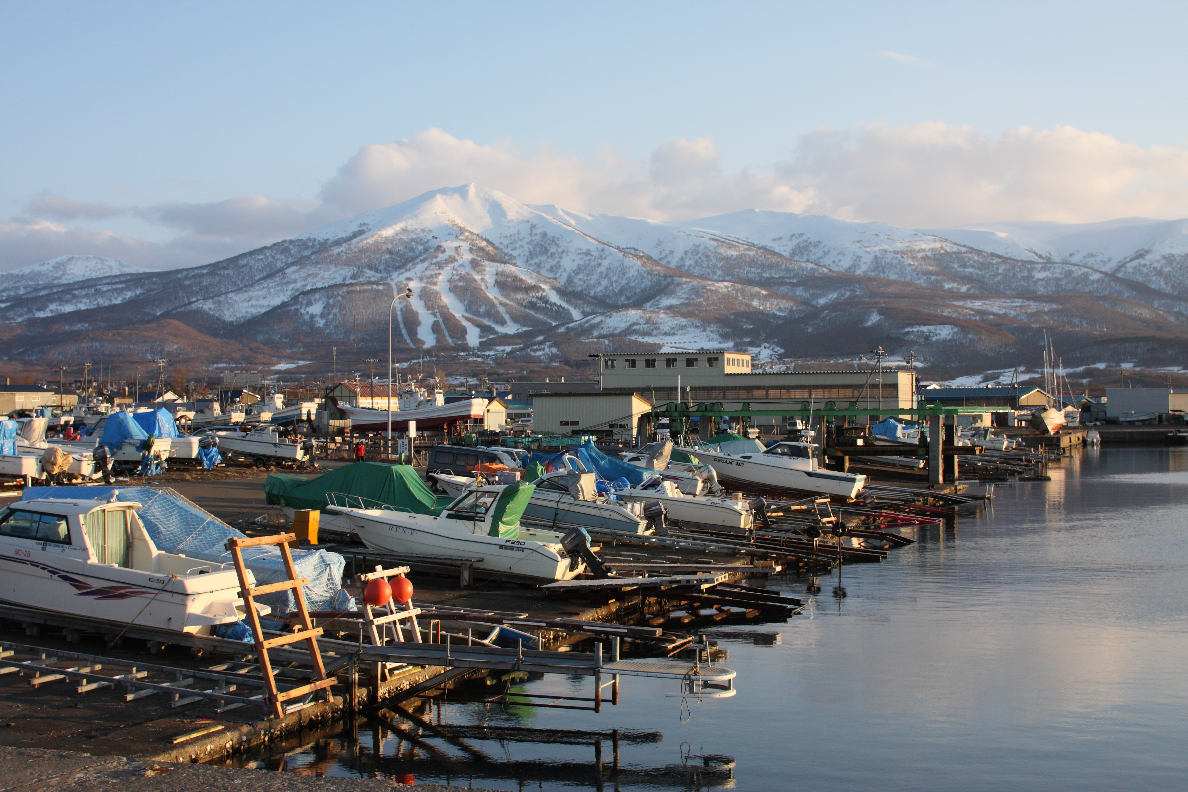 岩内港 Iwanai port